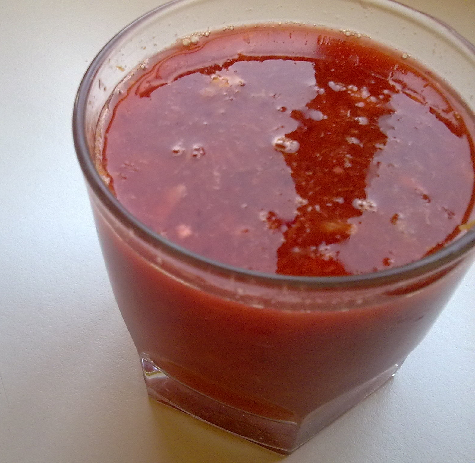 Un vaso de zumo de naranjas sanguinas.